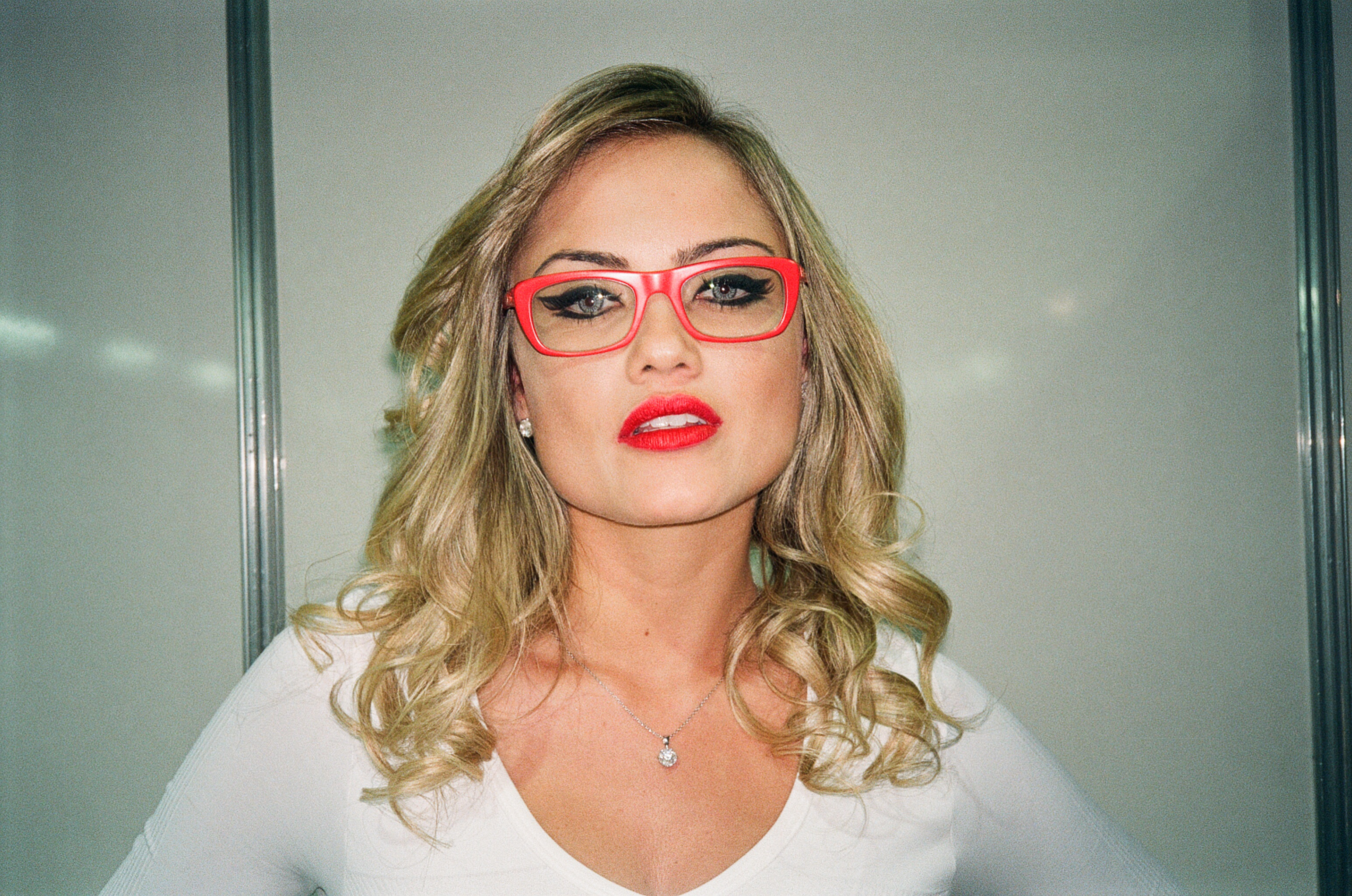 feat. Ellen Roche